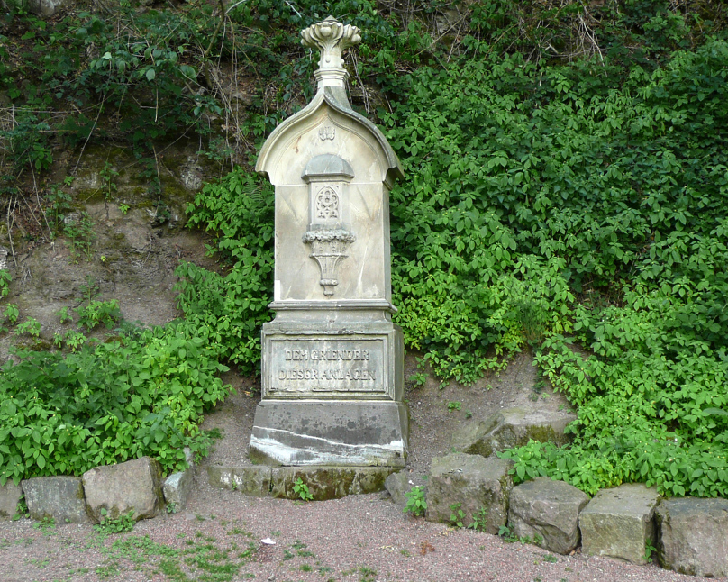 Denkmal Hake im Ohrbergpark